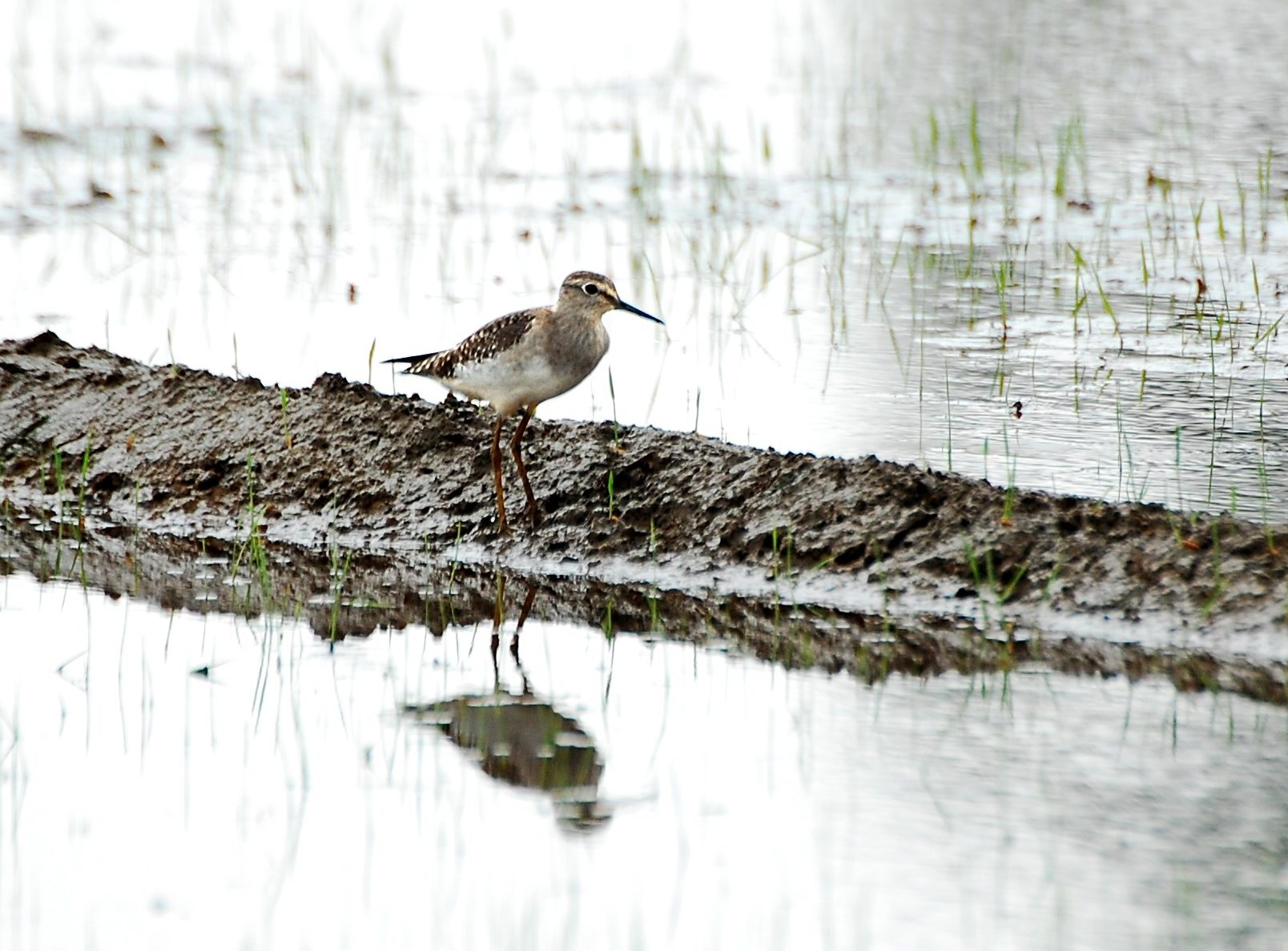 പുള്ളിക്കാടക്കൊക്ക്